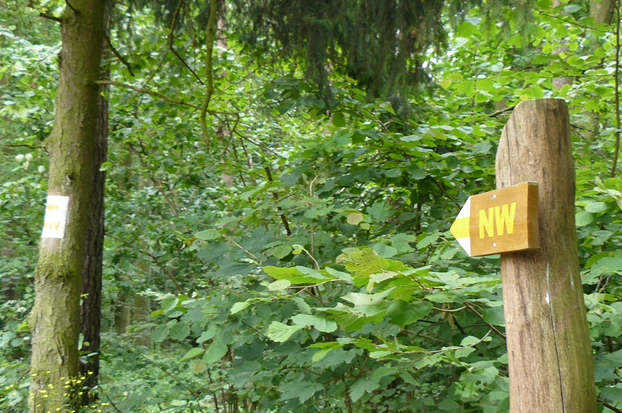 Park Krajobrazowy Promno, szlaki turystyczne nordic walking w okolicy jez. Brzostek.